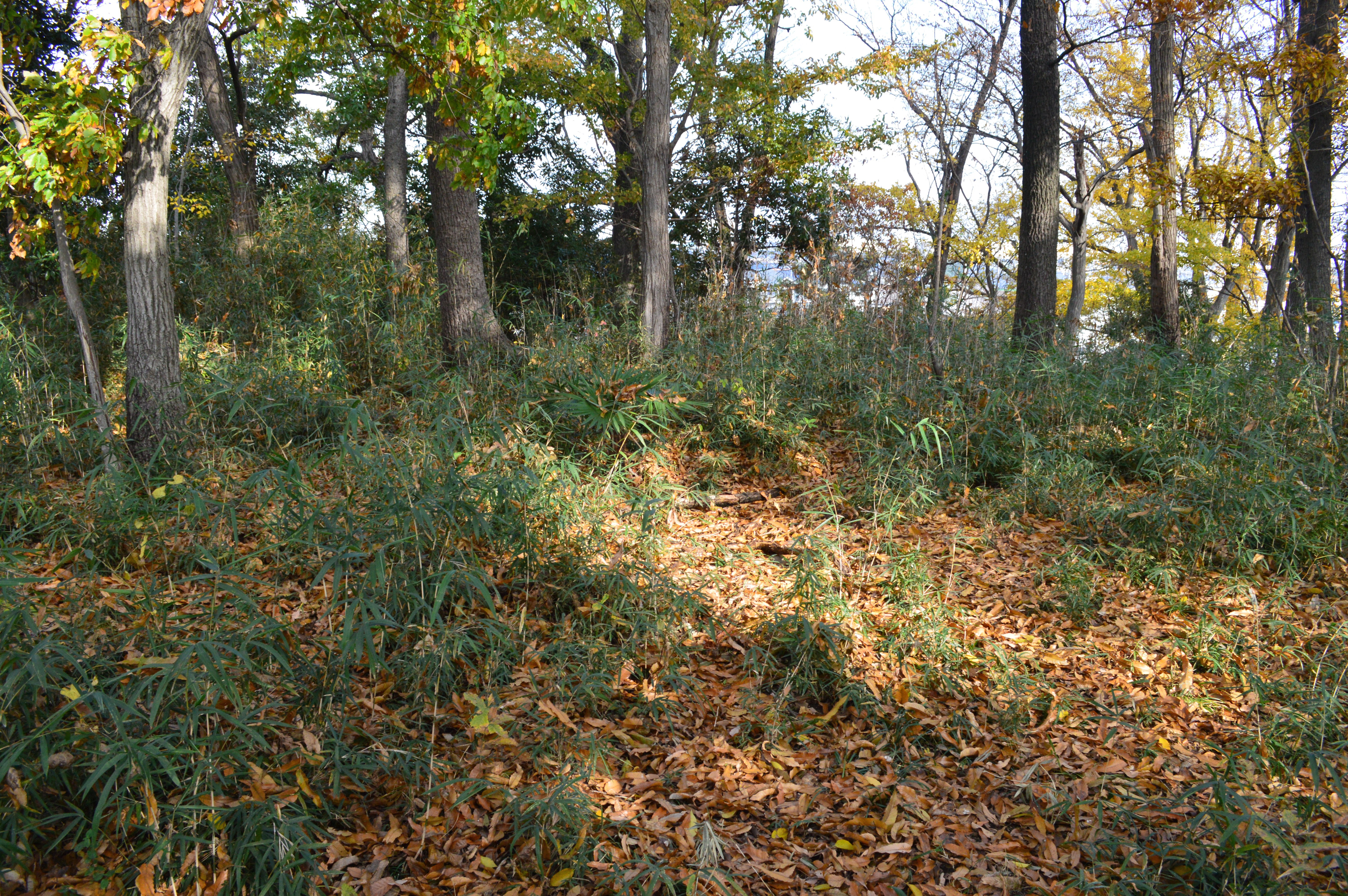 浅間山古墳 (高崎市) 後円部墳頂